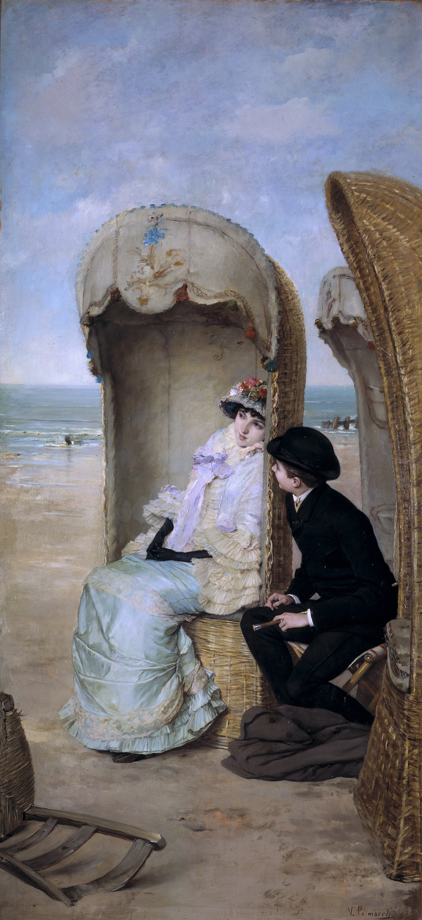 El título de la obra alude al flirteo de los dos personajes, jugando con las similitudes de la cesta con un confesionario. La escena aborda uno de los temas más frecuentes en la pintura de género de la segunda mitad del siglo XIX: el coqueteo y los juegos de las clases burguesas. Al optar por un formato vertical, el pintor concentra la atención en el hecho representado, la conversación galante entre los jóvenes, evitando que el espectador disperse su atención en el paisaje. El colorido claro, el dibujo preciso y la factura virtuosa son propios de las mejores pinturas de Palmaroli.